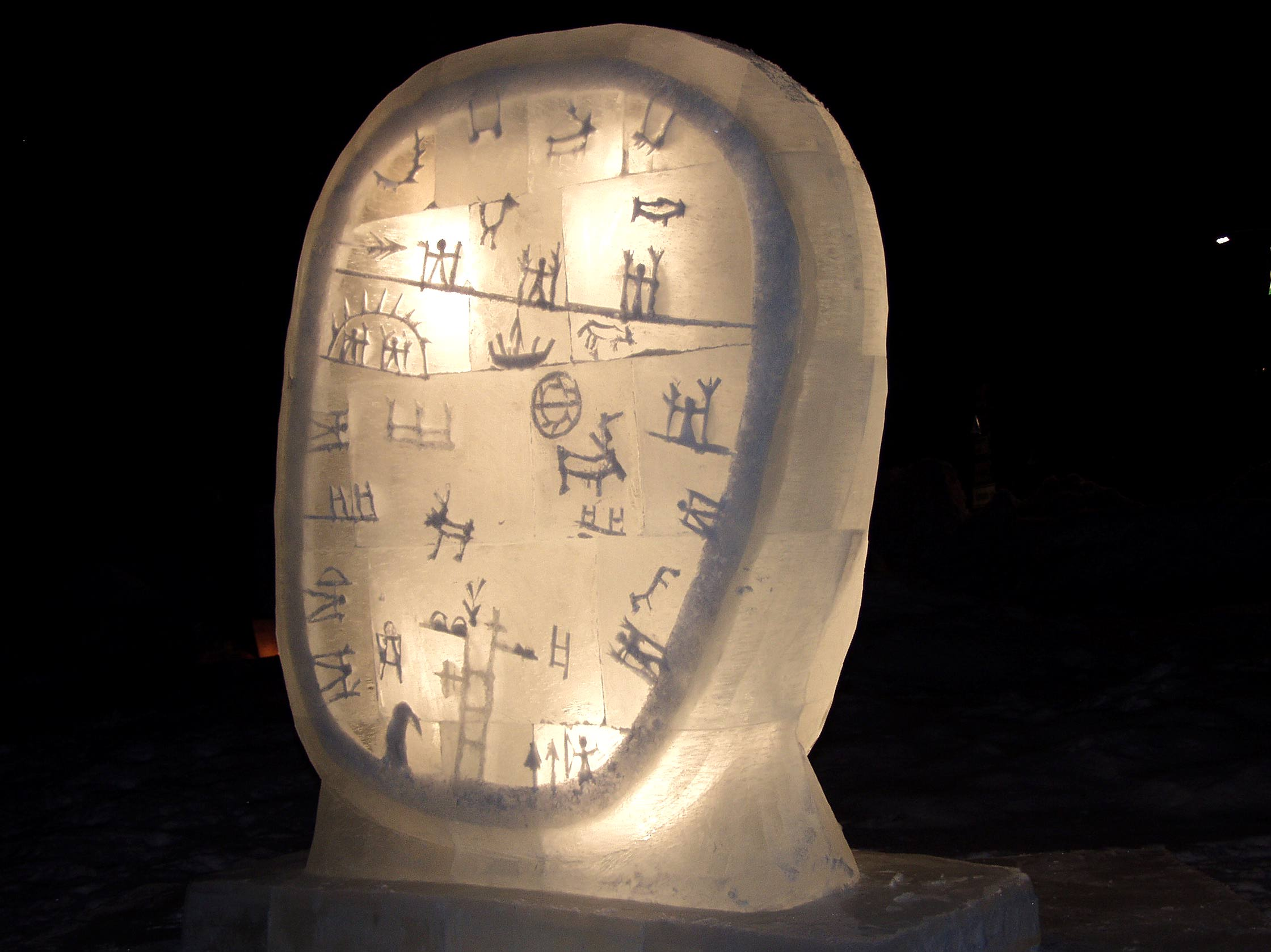 Eisskulptur in Form einer samischen Trommel auf Jokkmokks Wintermarkt